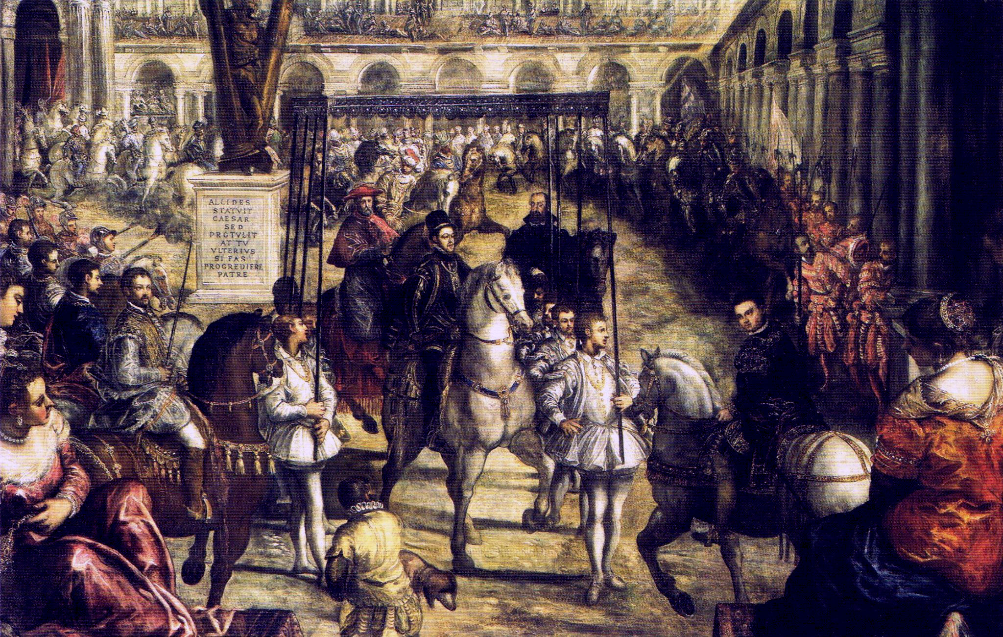 Ingresso di Filippo II di Spagna a Mantova - Olio su tela, cm. 211.7 × 330